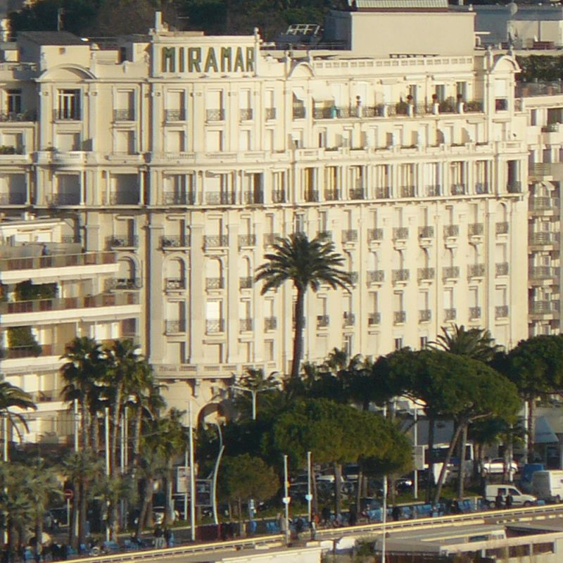 Palais Miramar à Cannes vue depuis la tour de la Castre au Suquet